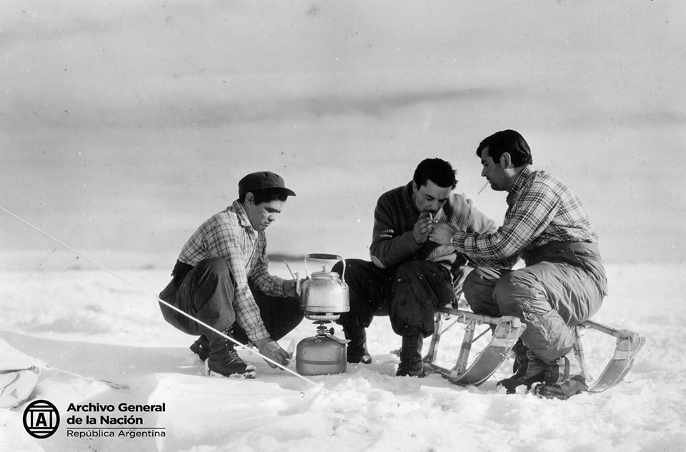 Mateada en el frío de la Antártida, 1963. Inventario 340070.